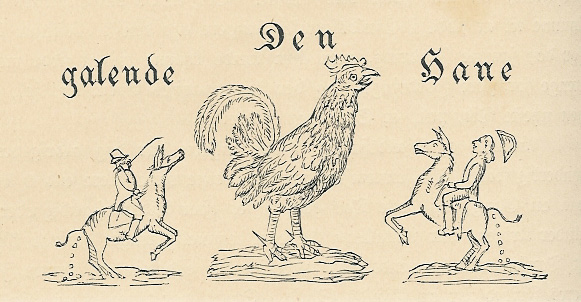 Titelvignet symboliserende bladet "Den galende Hane" udgivet af G.A. Müller.